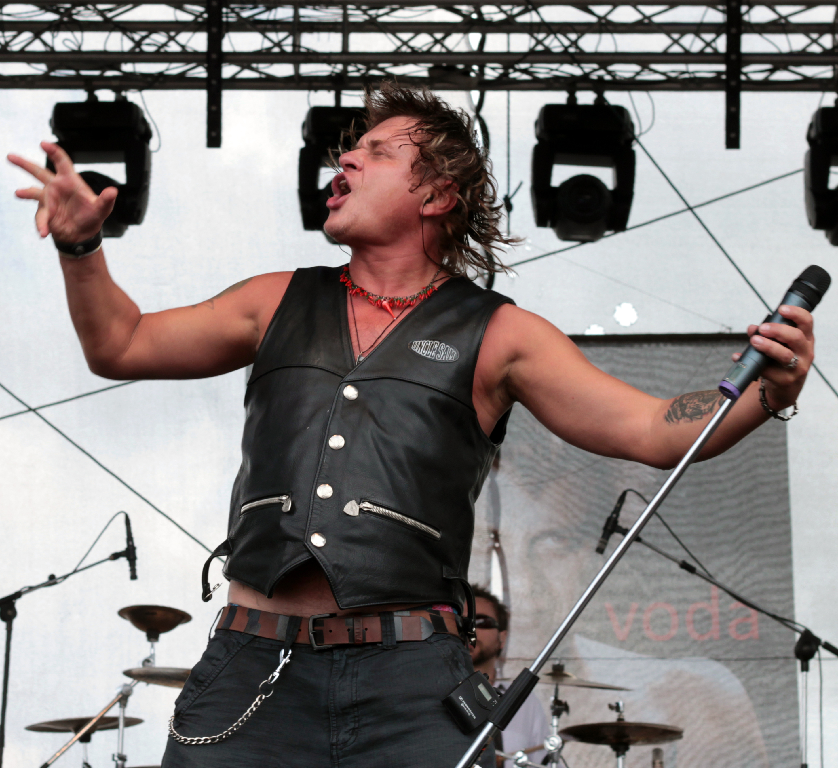 Český spevák a basgitarista Vilém Čok